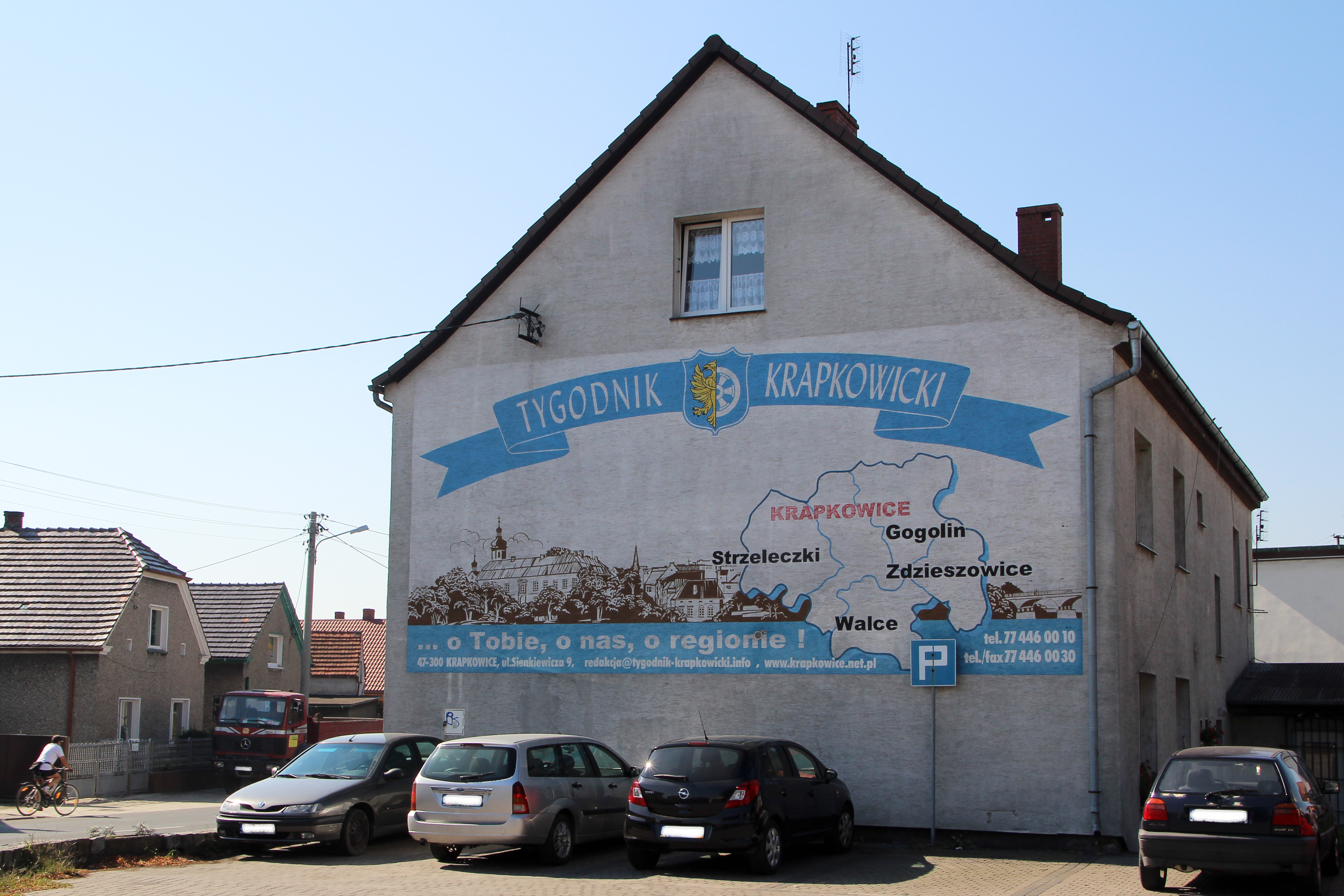 Mural Tygodnik Krapkowicki w Krapkowicach – miasto w Polsce, w województwie opolskim.